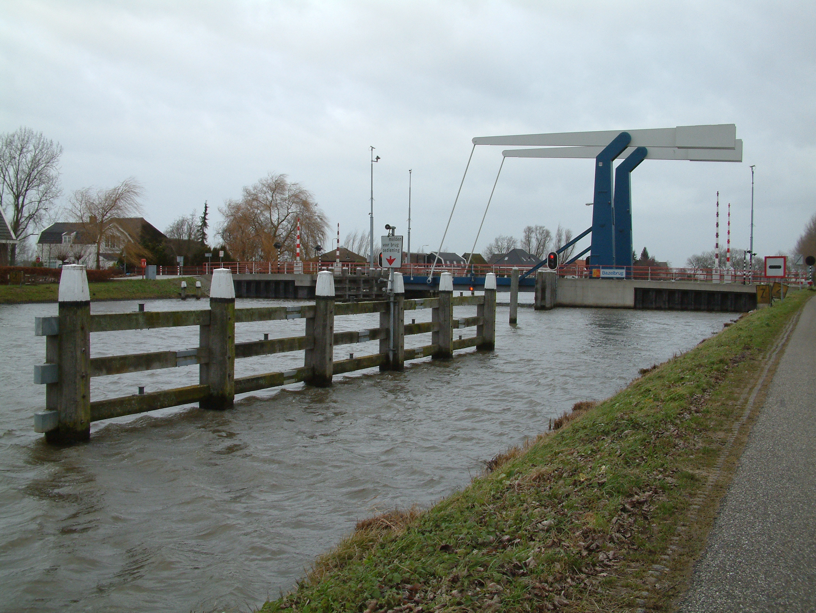 Remmingwerk voor de Bazelbrug in het Merwedekanaal